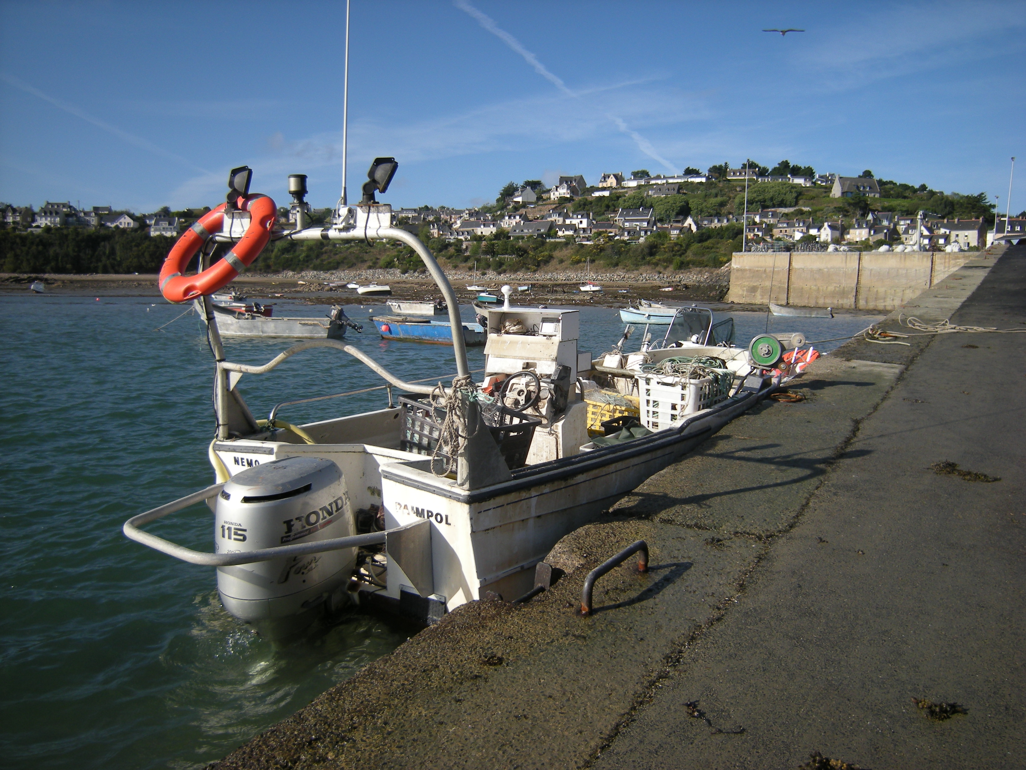 Vues de Ploubazlanec depuis Pors-Even et depuis la Croix des veuves : Pors-Even, île Saint-Riom et baie de Launay Vedette rapide de pêche pour filets, casiers et lignes au port de Pors-Even